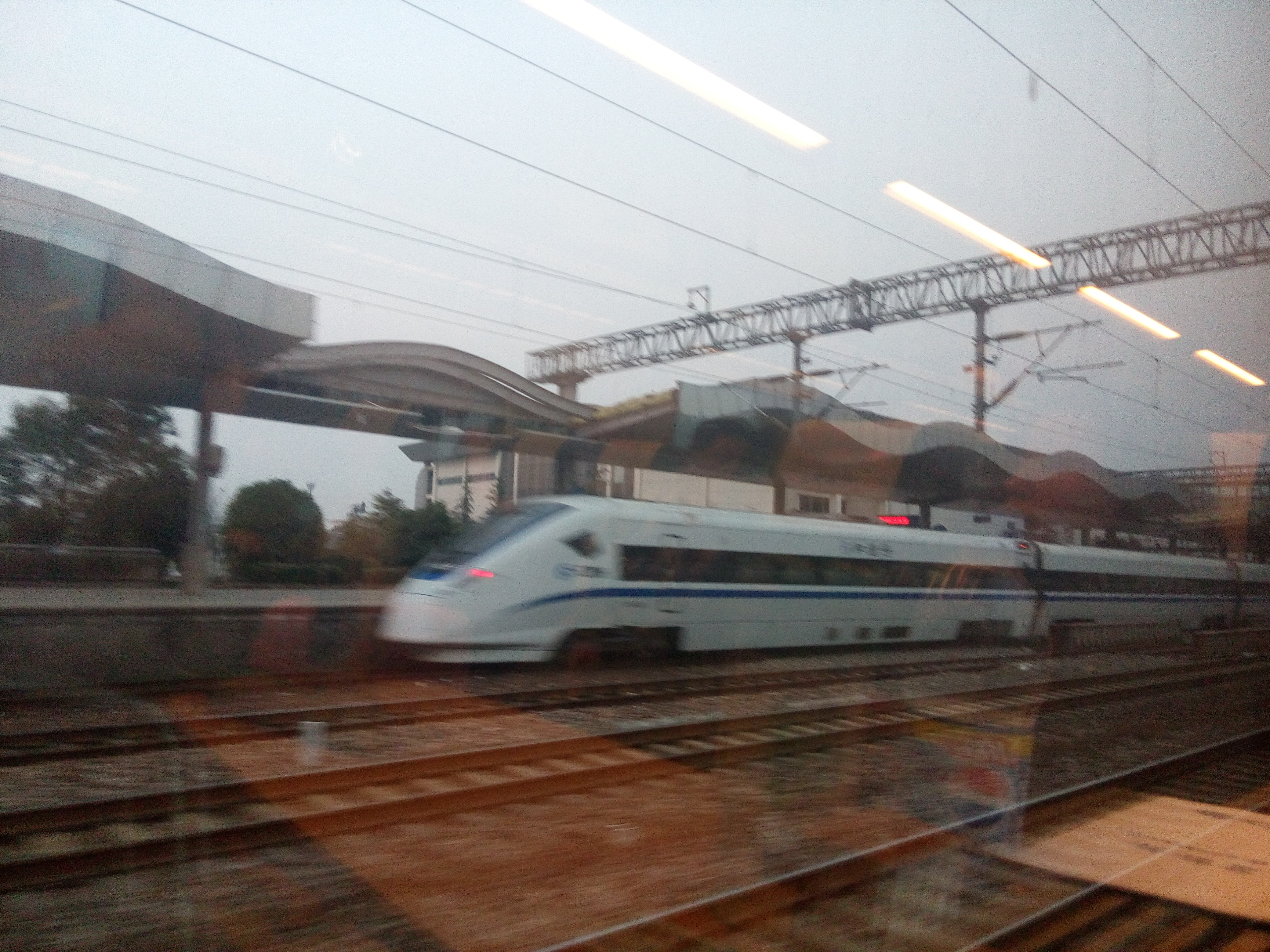 衢州站的列车 图为长沙到上海虹桥的CRH1E